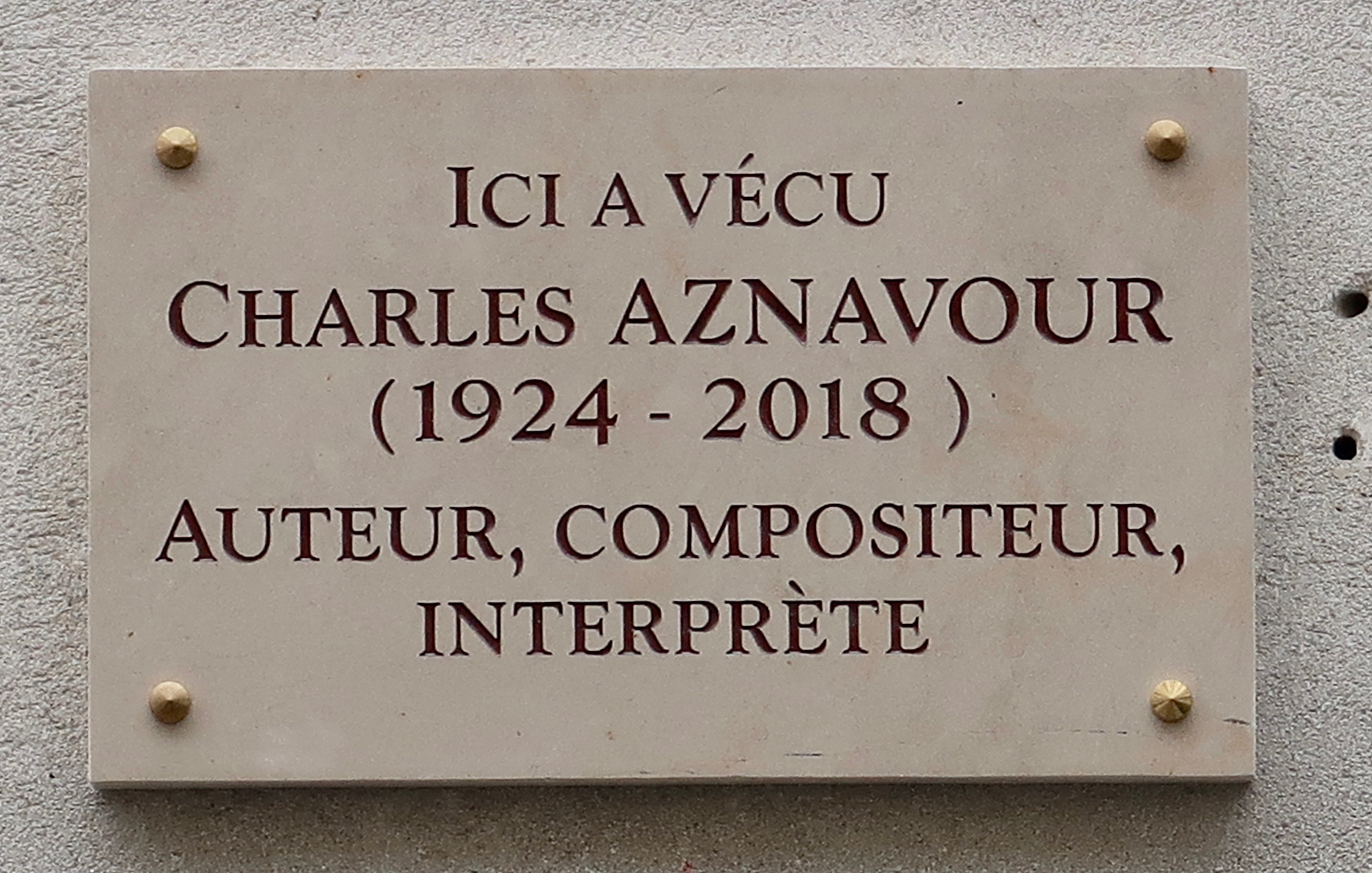 Plaque en hommage à Charles Aznavour, 36 rue Monsieur-le-Prince (Paris, 6e).